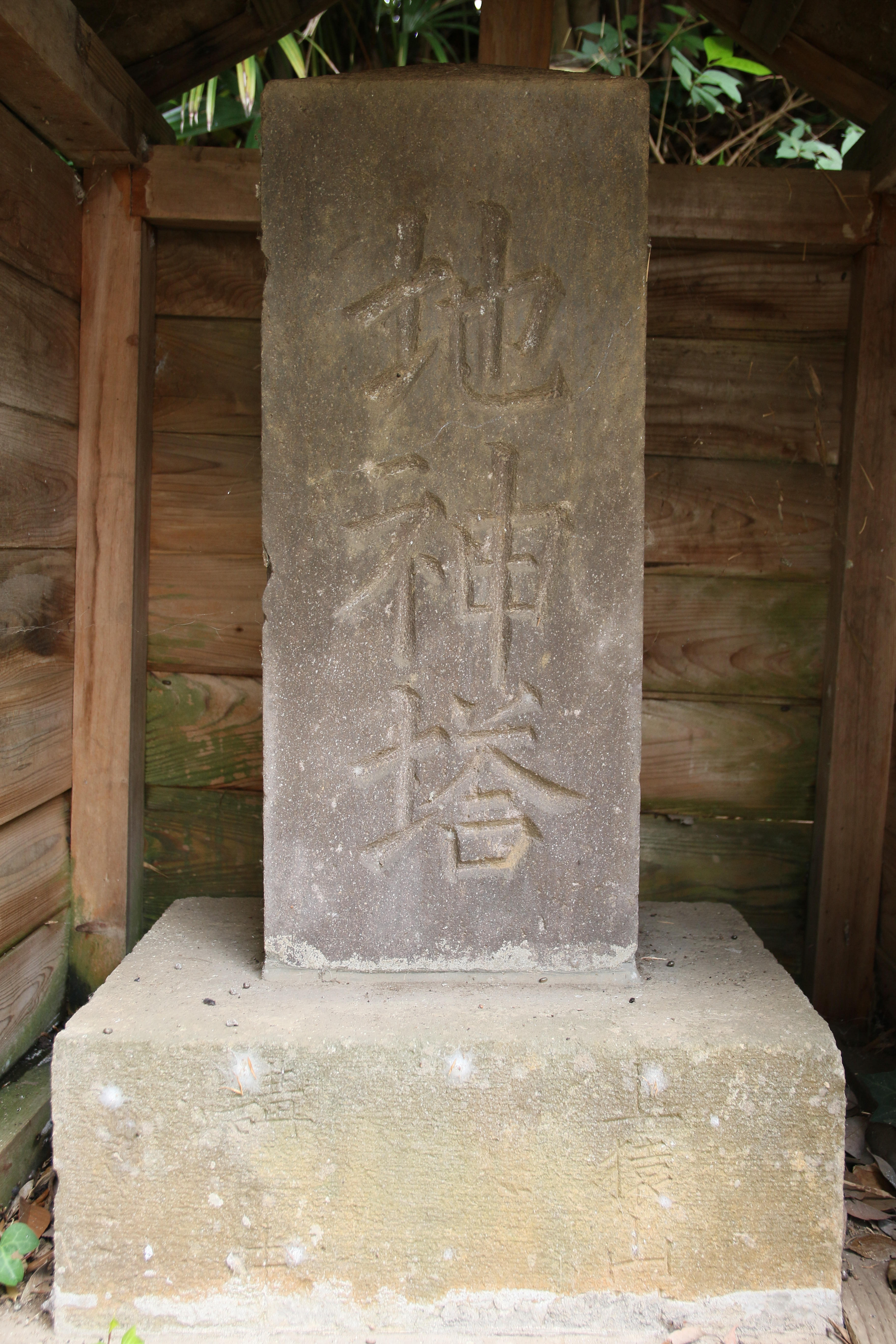 横浜市緑区上山の地神塔